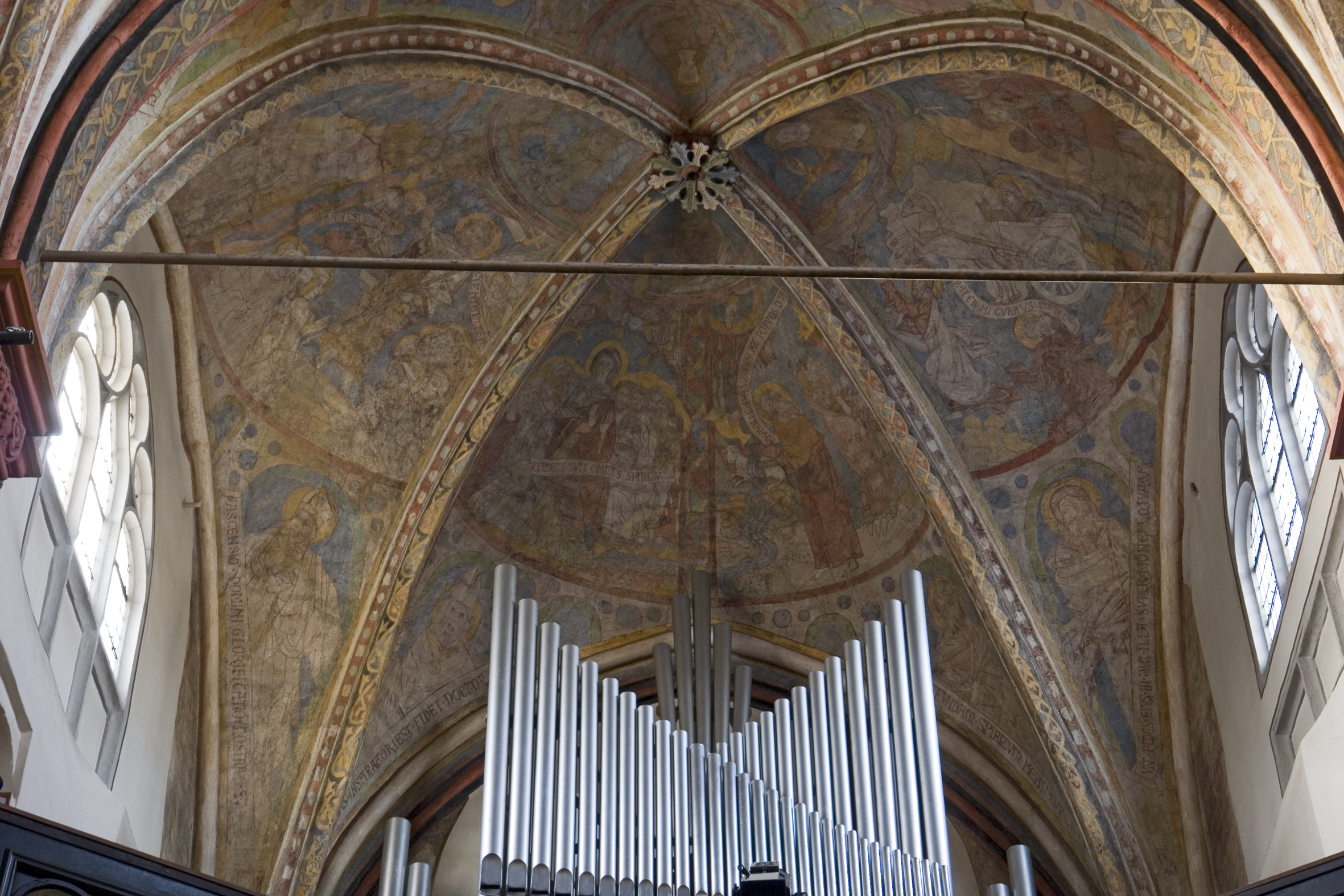 St. Maria in Lyskirchen, Gewölbefresken (über dem Eingang)